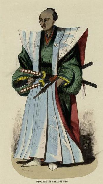 Japanese [samurai] gala costume. Original caption: Japanese im Gallekleide. Published in Die Völker des Erdballs : nach ihrer Abstammung und Verwandtschaft, und ihren Eigenthümlichkeiten in Regierungsform, Religion, Sitte und Tracht by Heinrich Karl Wilhelm Berhaus, published 1845-1847.